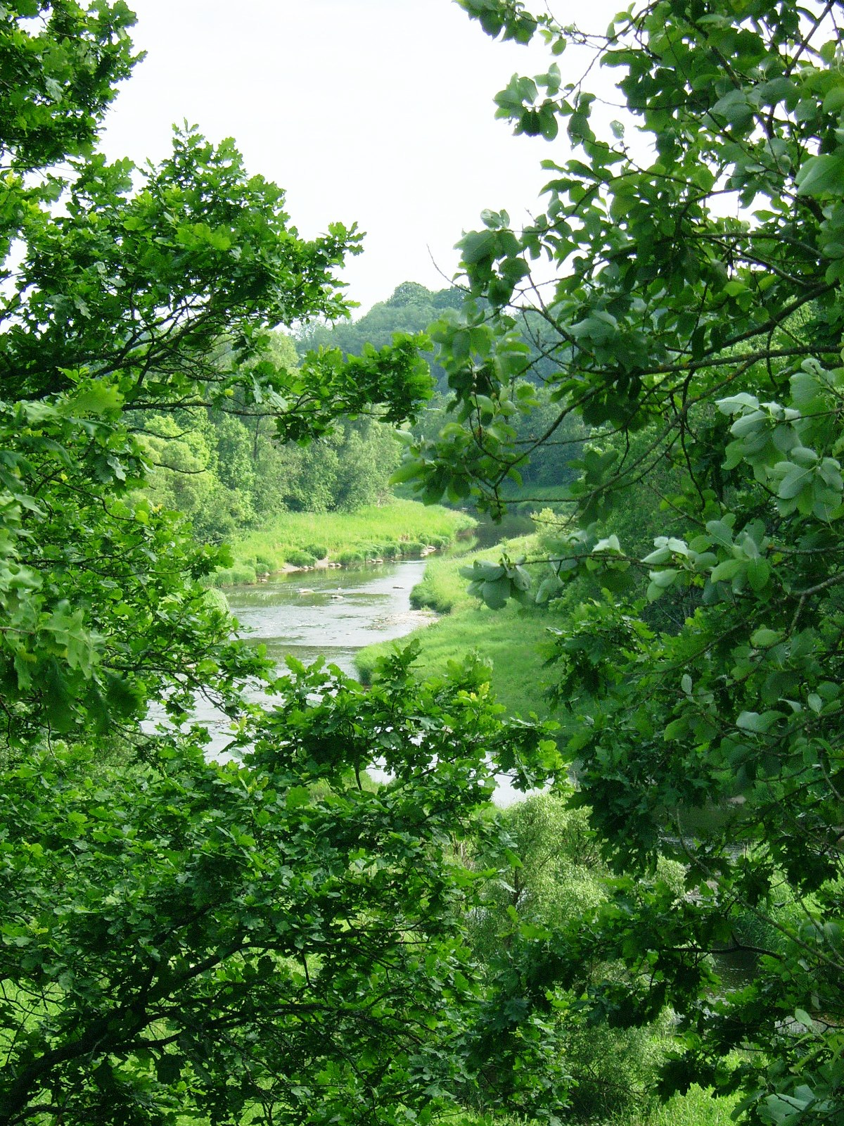 Reksčių regykla. Vaizdas į Jūrą.